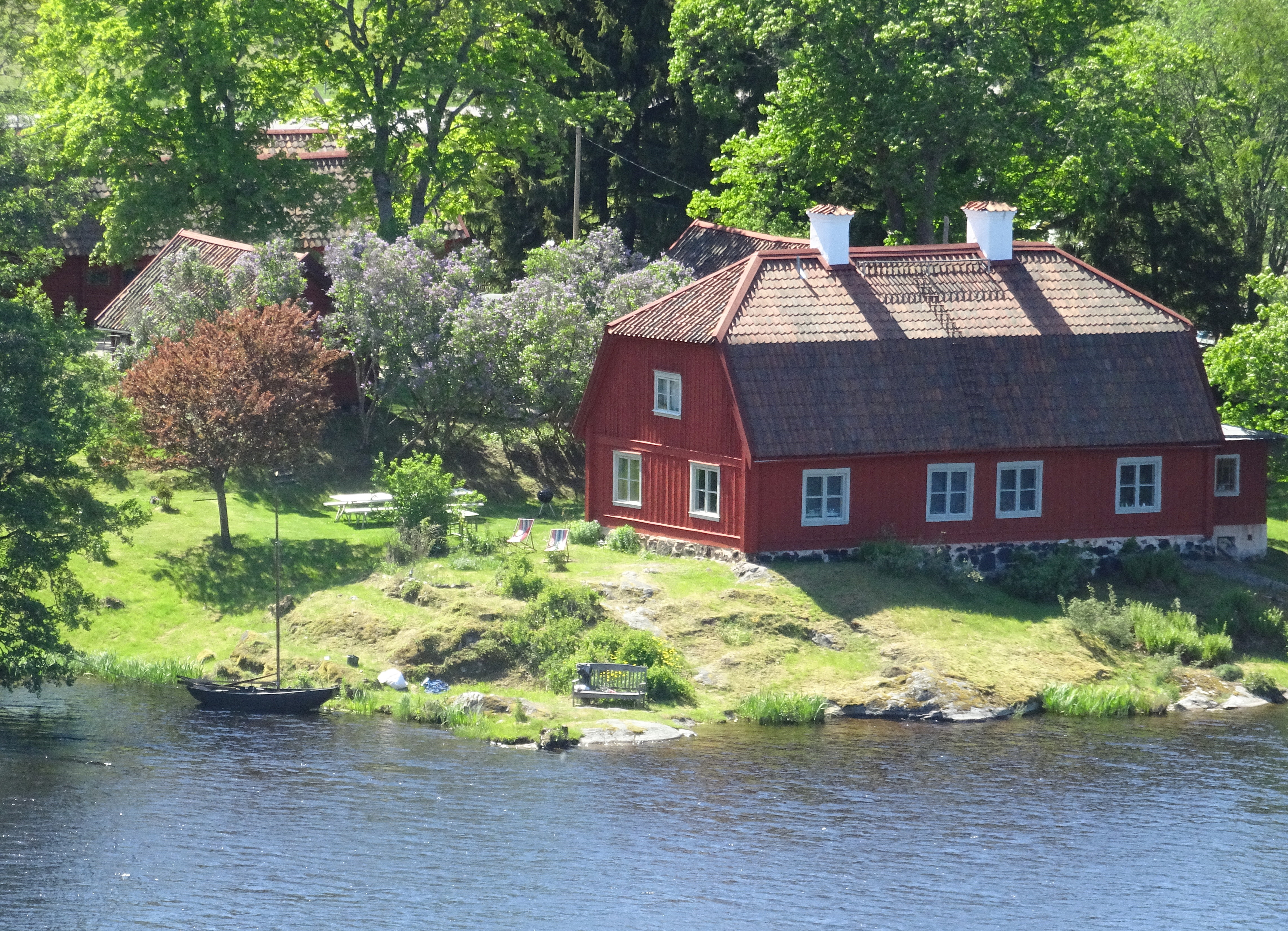 Gården Källtorp vid Källtorpssjön